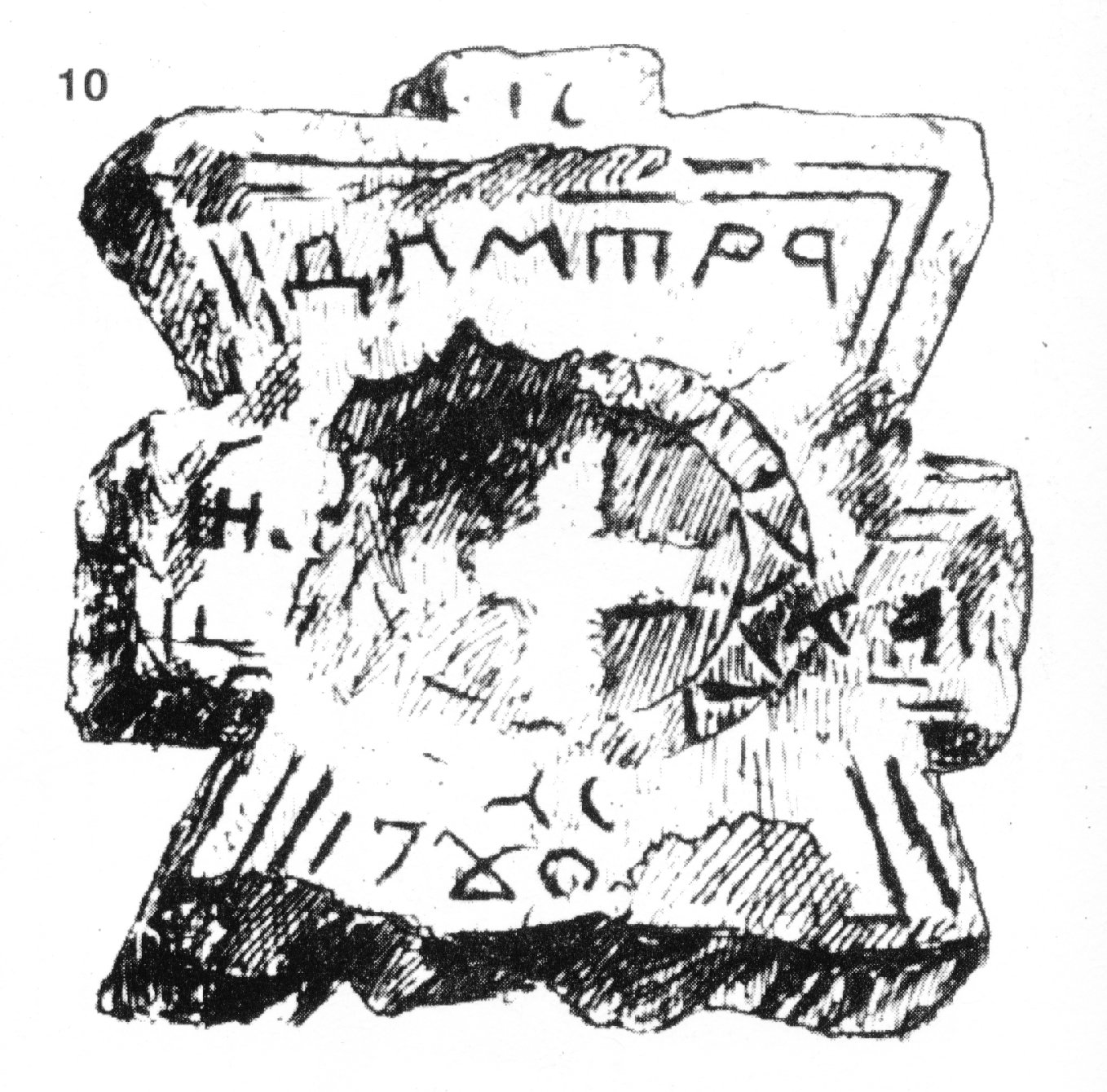 10. Кръст -надгробен паметник, из двора на църквата „Св. Никола" в гр. Лом. Издълбан е грубо в 1780 г. От мек бял варовик. Лицето му е полуизтрито, върху него личат релефен равнокрилен кръст, заобиколен с венец от зигзаговидна гравирана фриза; гравирани линии, успоредни на външния контур; вензелите и надпис. Четирикрилен. Горното му крило е трапецовидно и завършва с четвъртита шапчица. Размери: 29x31x11 см. Скициран на 25.IV. 1917 г. (Т. 6, обр. 1.)